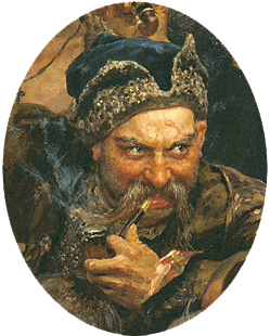 detail: Ivan Sirko